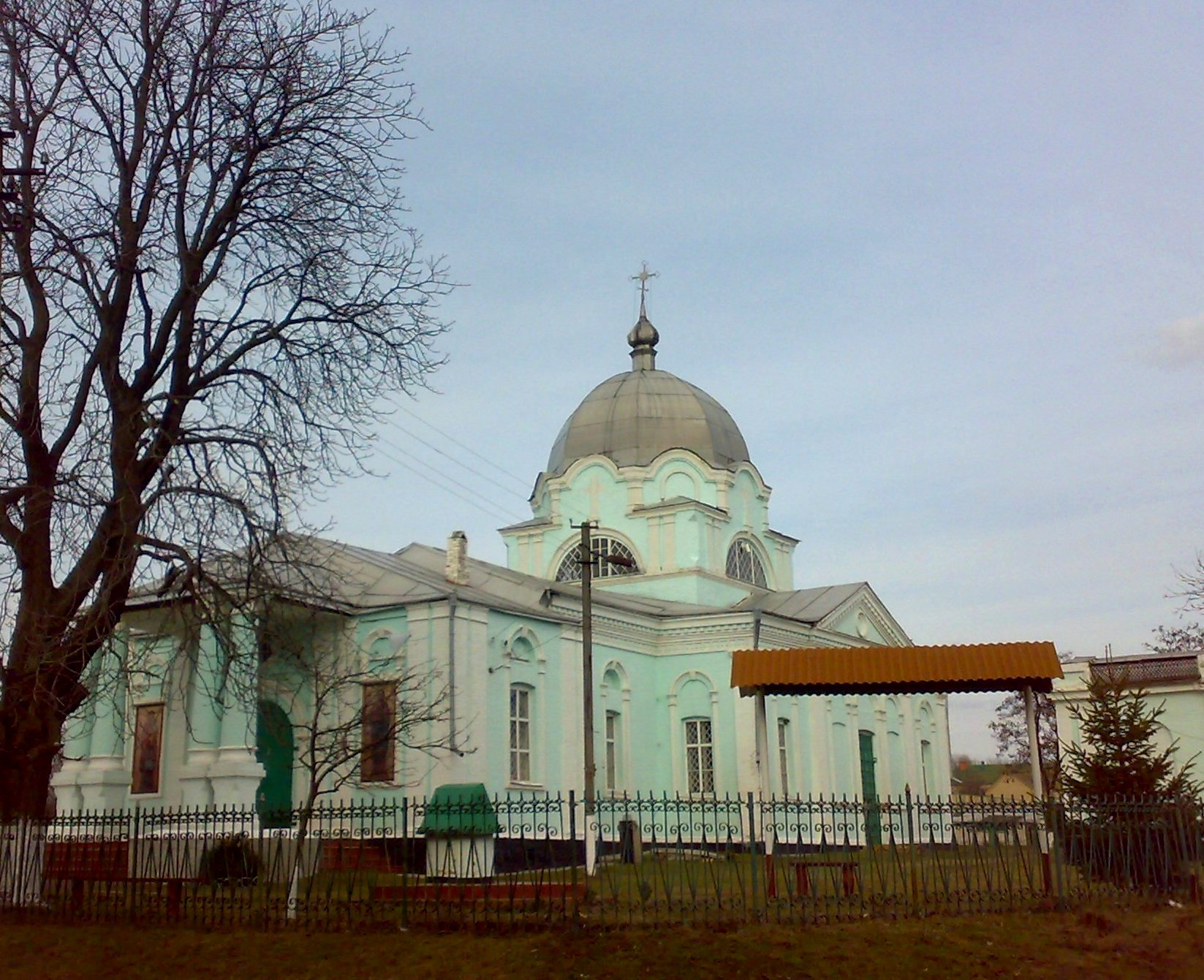 Миколаївська церква в Златополі (Новомиргород, Кіровоградська область, Україна)